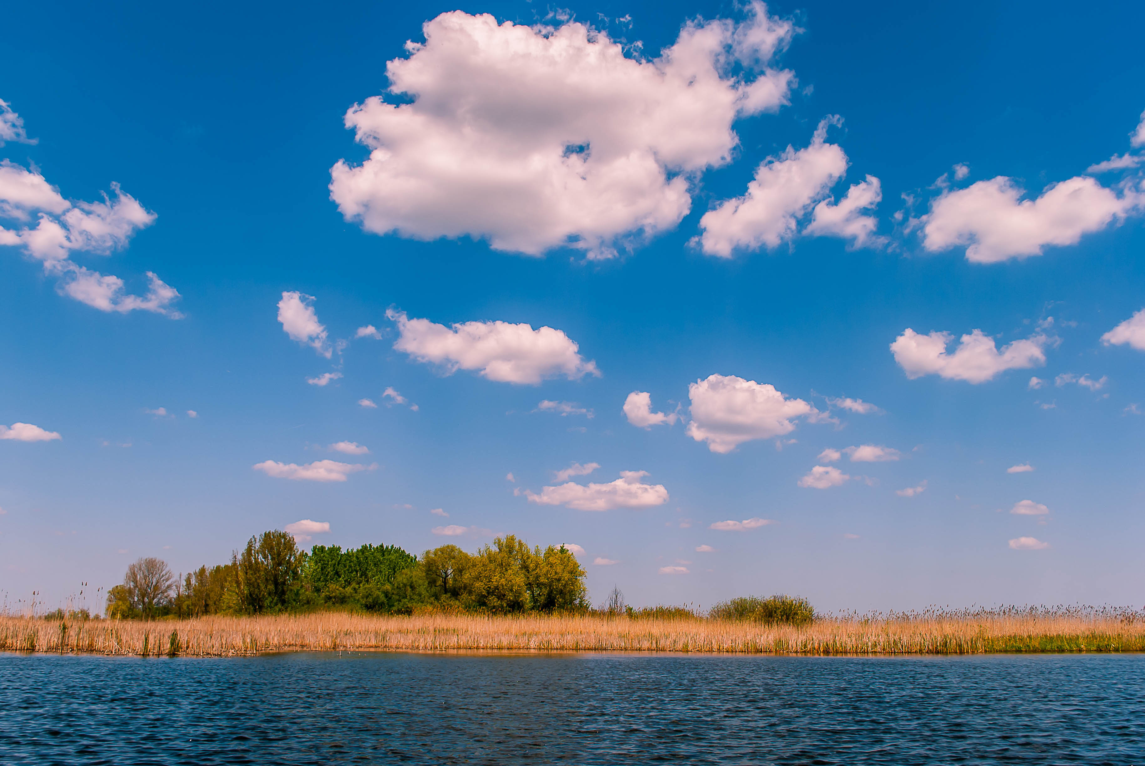 Ово је фотографија заштићеног природног добра у Србији под шифром: РП09This is a a photo of a natural area in Serbia with ID: РП09 Carska bara